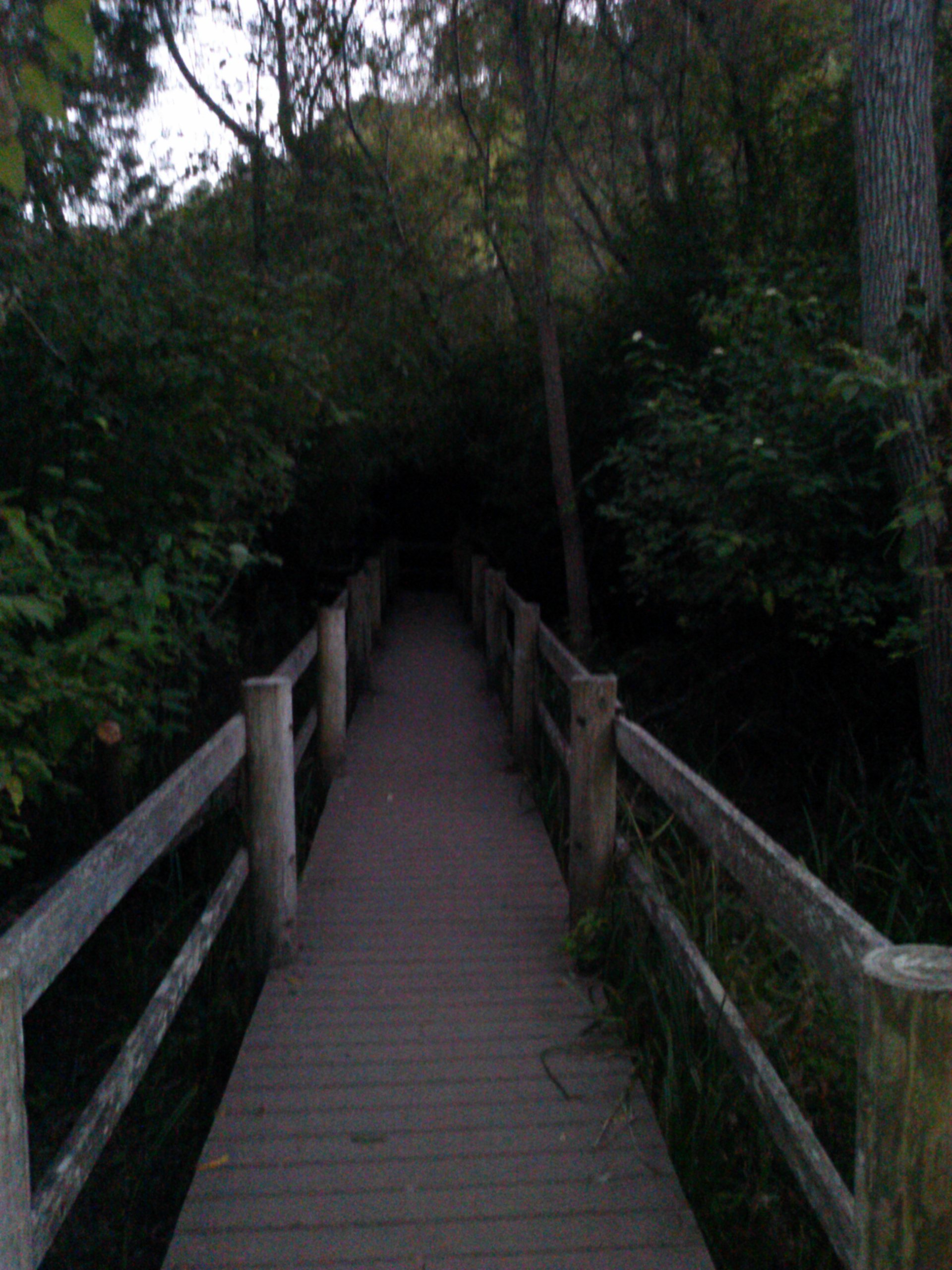 Boardwalk to Jewel Lake